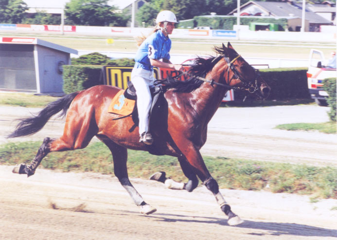 Bildname: Trabreiten Aufnahme: Trabrennbahn Krieau/Wien/Österreich